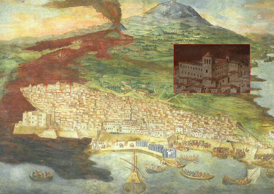 Giacinto Platania, Catania raggiunta dalle colate laviche dell'eruzione dell'Etna del 1669. Affresco nel Duomo di Catania.